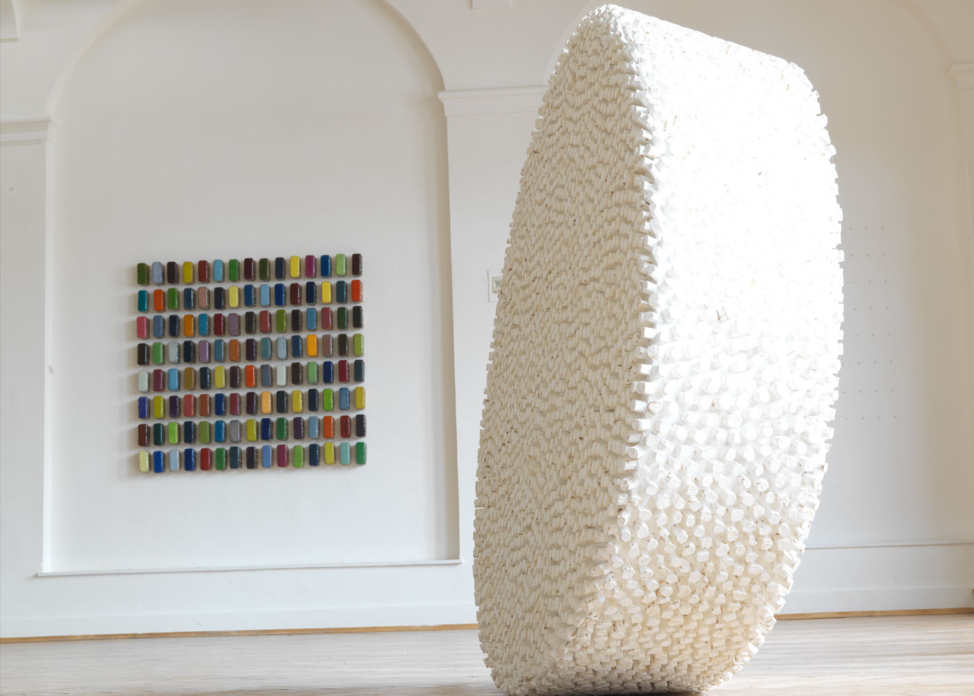 Skulptur von Willi Siber, ausgestellt 2009 in der Städtische Galerie Ravensburg